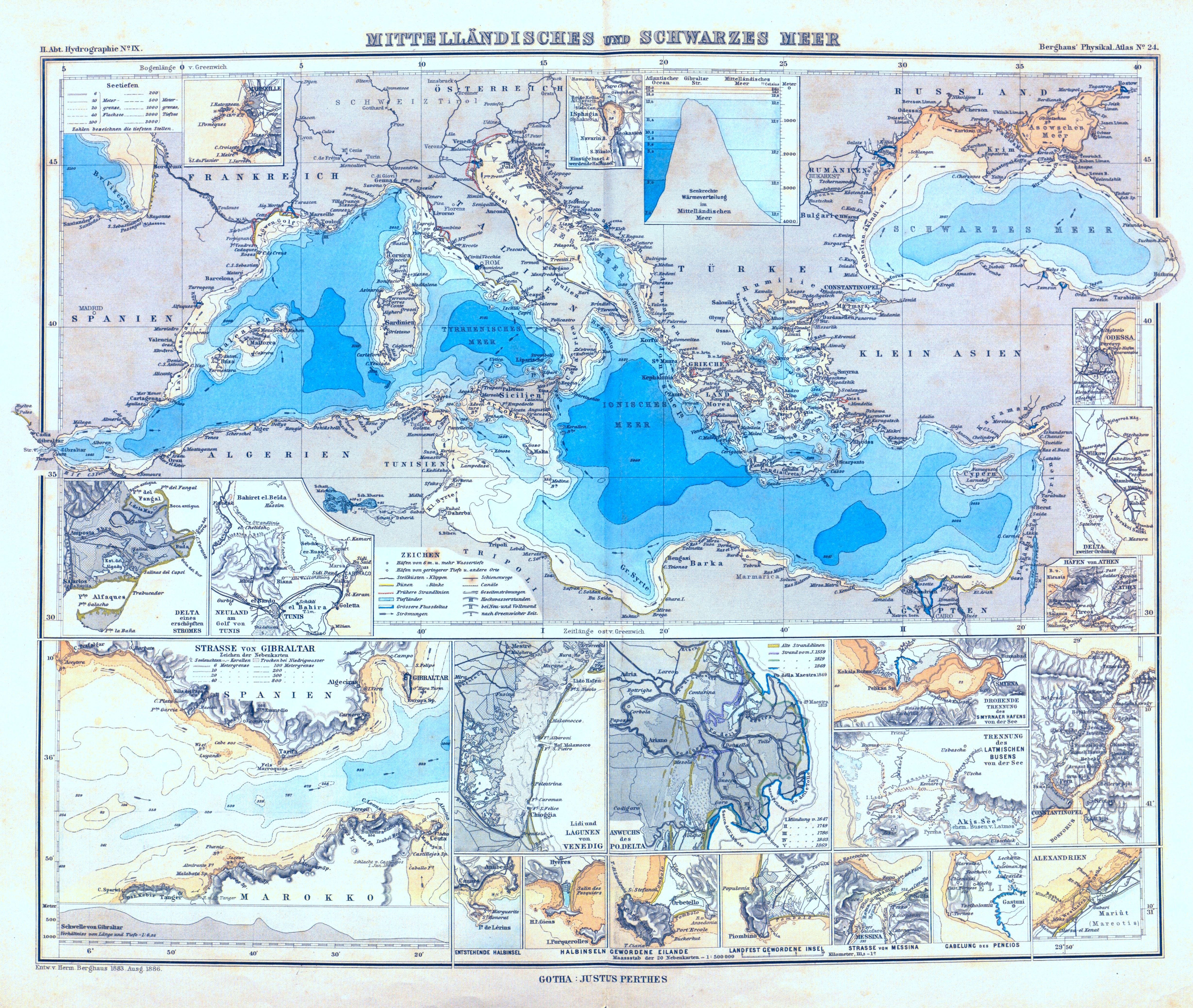 Atlas der Hydrographie, Gotha: Justus Perthes, 5 S., 11 Karten (pdf 57 MB) - No. IX, Mittelländisches und Schwarzes Meer